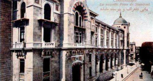 Büyük Postane, Sirkeci PTT Merkezi İstanbul'un Fatih ilçesindeki Sirkeci semtinde yer alan Türkiye'nin en büyük postane binasıdır.